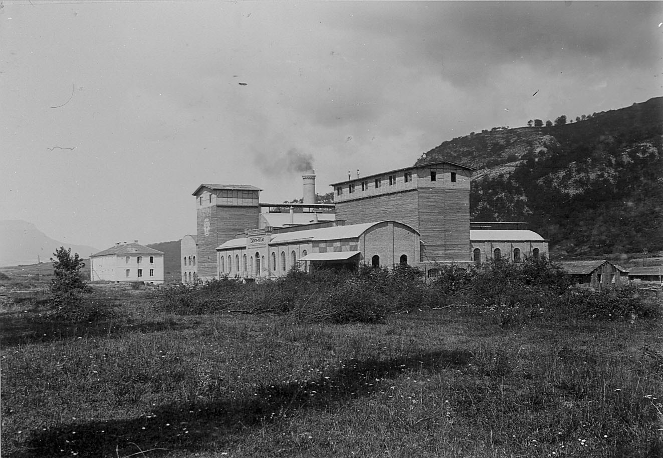 Cementos Portland Olazti, 1903